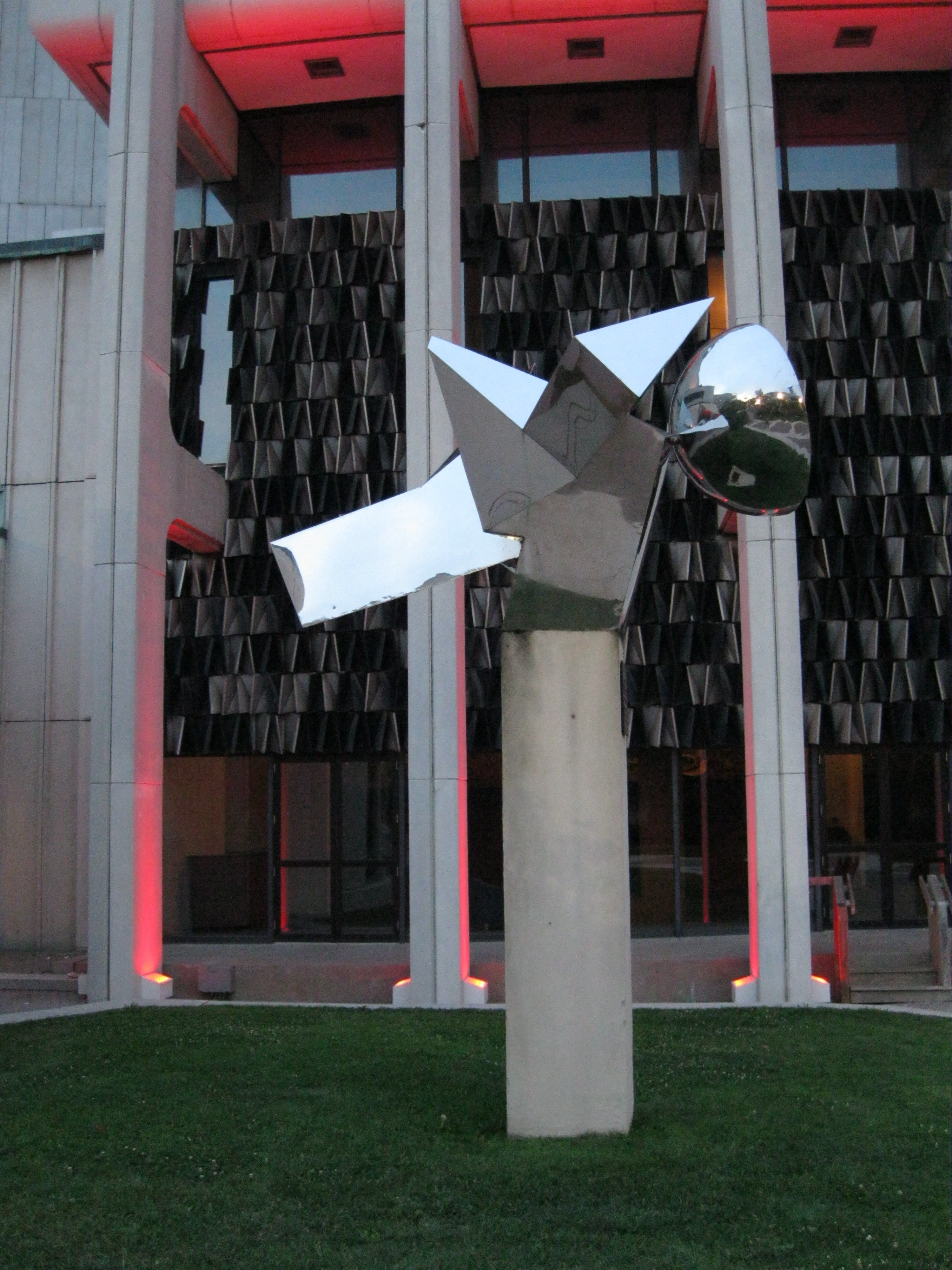 Maïrel, No 1, de Luis Feito, Place des Arts, Montréal